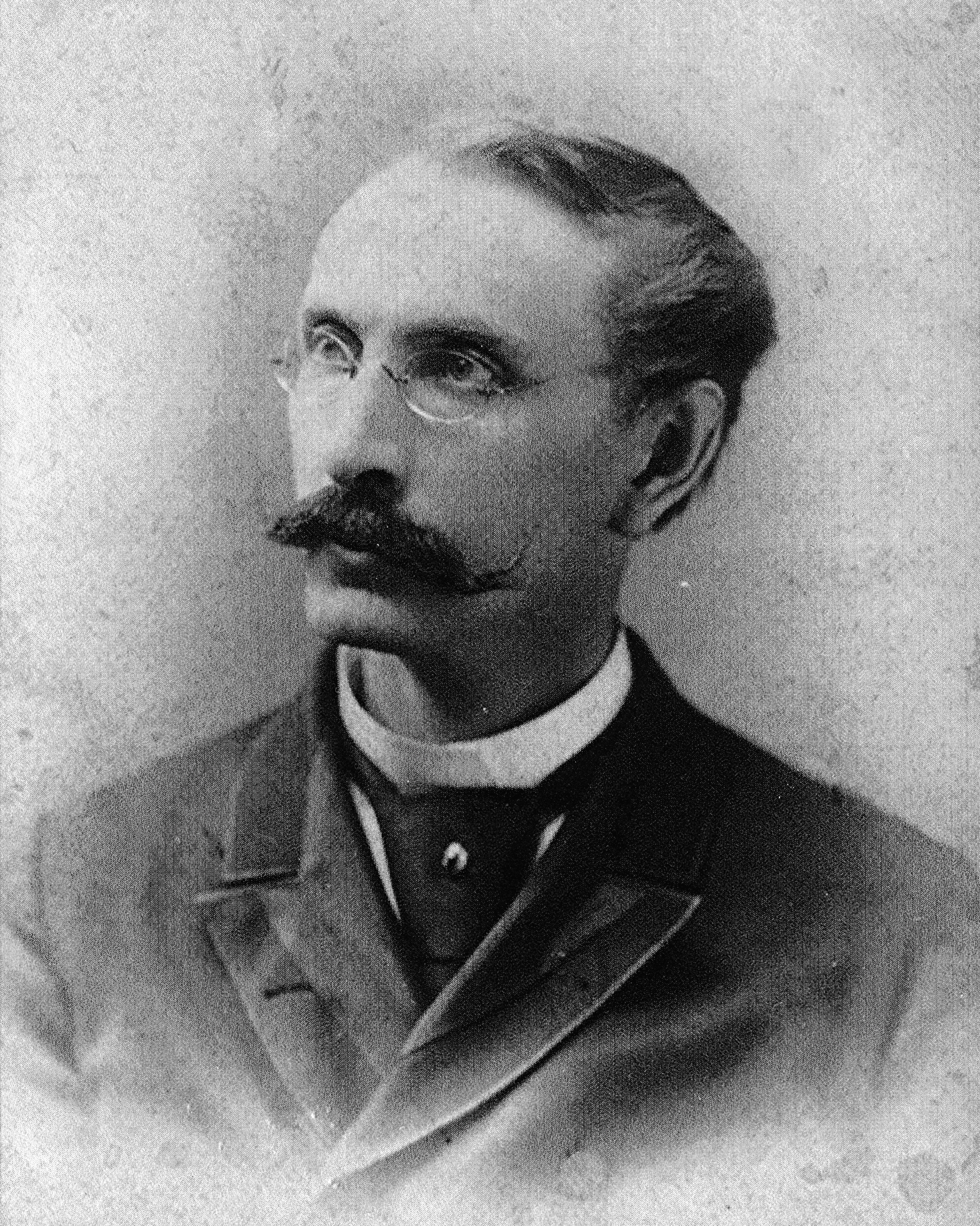 George H Griebel, architect